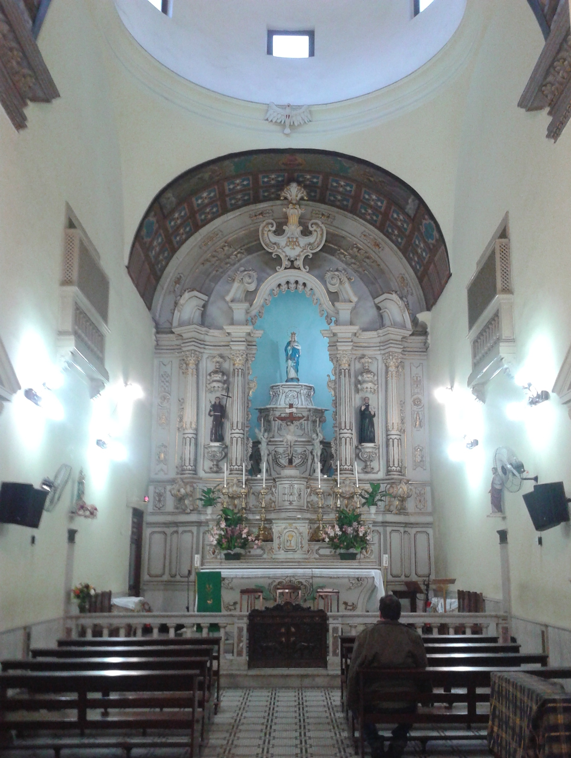 Igreja de São Gonçalo, São Paulo, SP, Brasil.